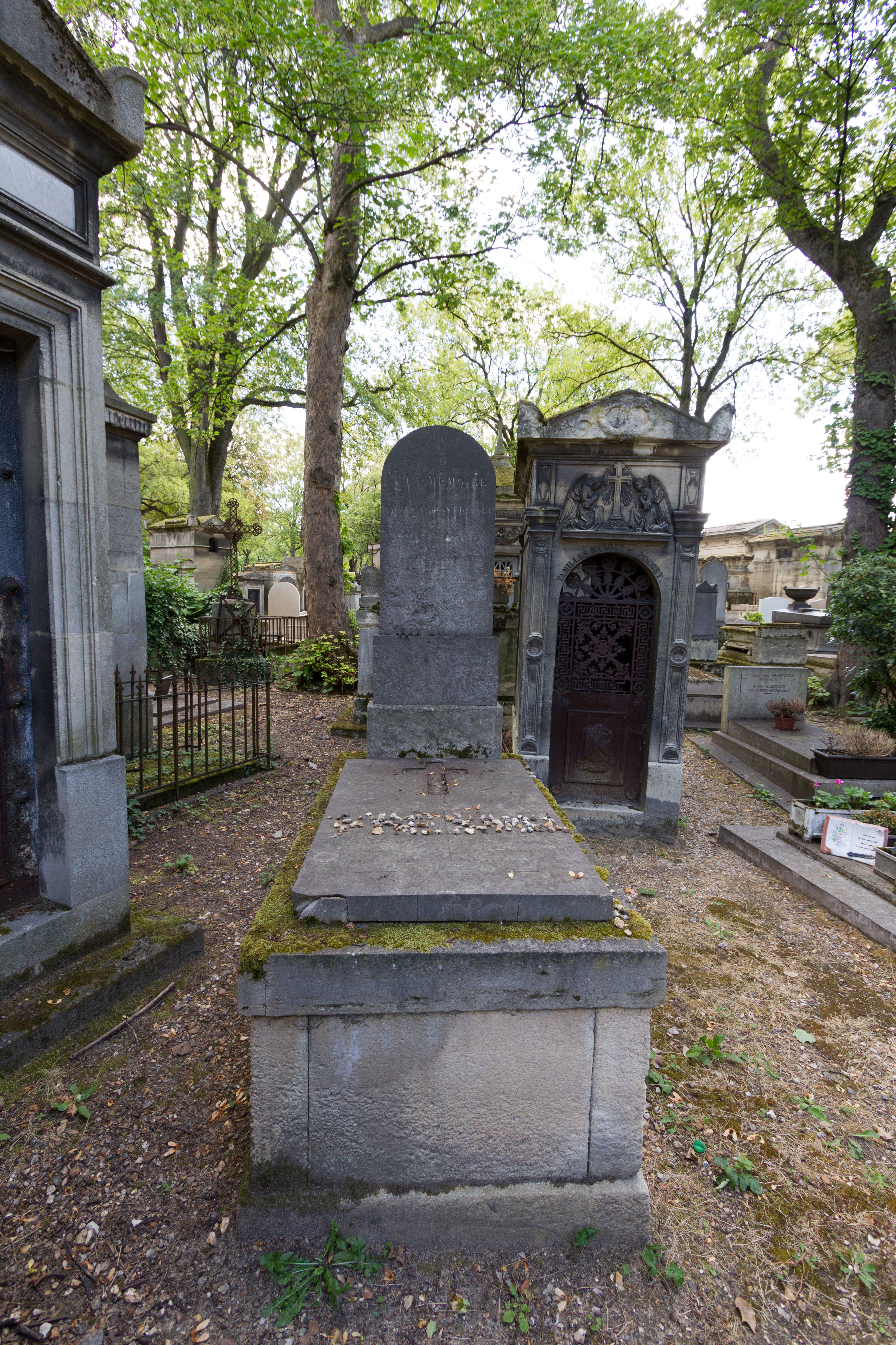 Sépulture d'Augustin Fresnel (1788-1827), physicien français. Fondateur de l’optique moderne, il proposa une explication de tous les phénomènes optiques dans le cadre de la théorie ondulatoire de la lumière.